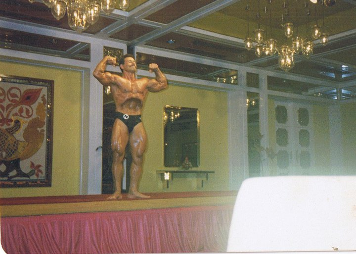 عزيز عبد الكريم التميمي